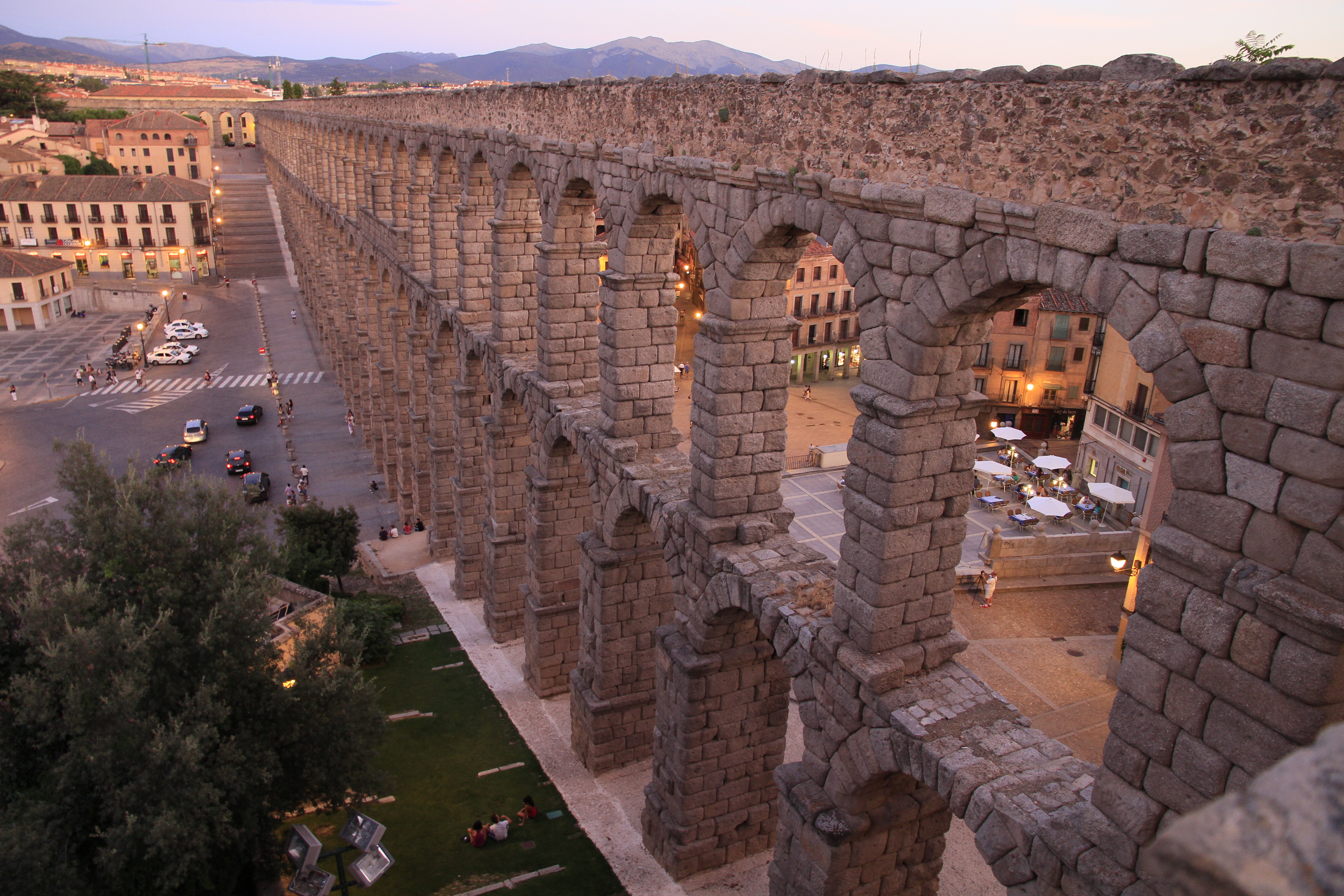 Acueducto de Segovia.